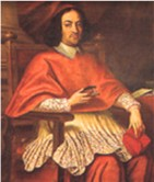 Ritratto cardinale Decio Azzolino